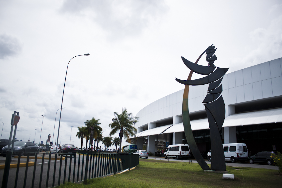 20/02/2013 Missão Palmares percorre três cidades do estado de Alagoas - Maceió, Arapiraca e União dos Palmares (CC BY-SA Fora do Eixo)